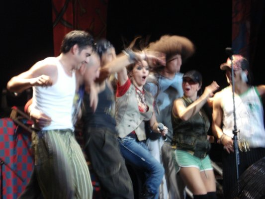 Belinda con sus bailarines en el Auditorio Coca Cola en Monterrey Nuevo León, durante su gira Utopía